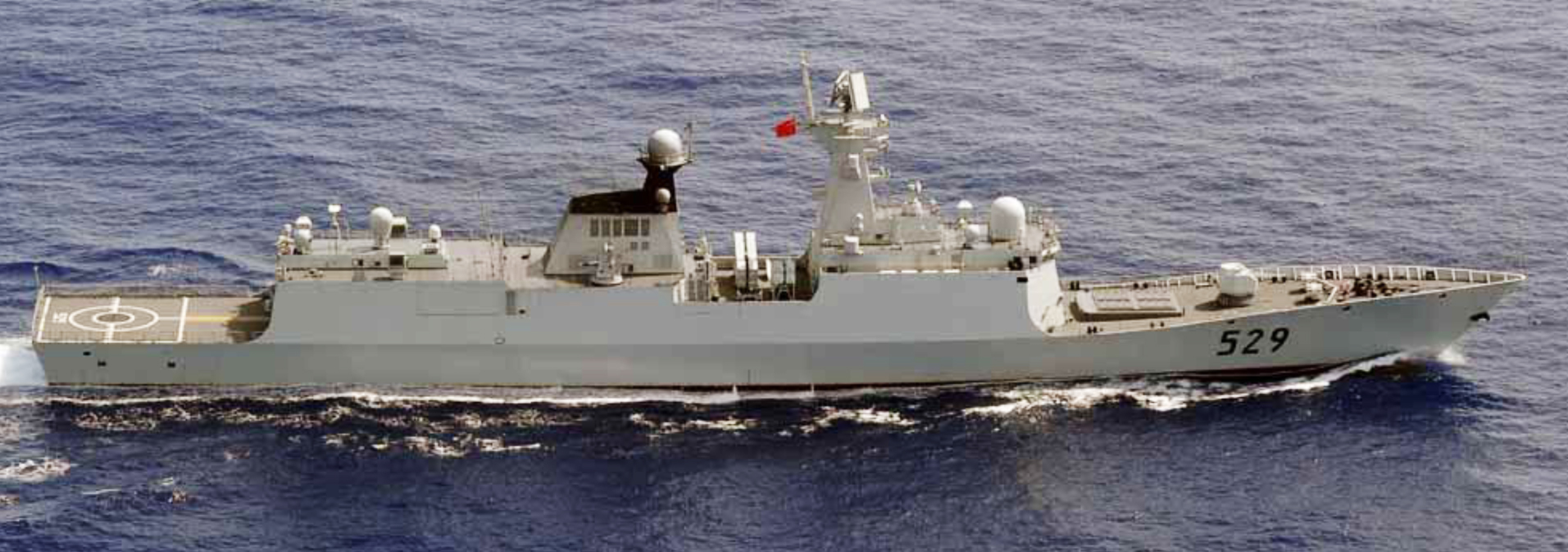 ５月１４日（月）午後２３時頃から午後２４時頃にかけて、海上自衛隊第５航空群（那覇）所属「Ｐ－３Ｃ」、第６護衛隊「たかなみ」（横須賀）及び第１５護衛隊「はまぎり」（大湊）が、宮古島の北東約１１０ｋｍの海域を太平洋から東シナ海に向けて北西進する中国海軍ジャンカイⅡ級フリゲート２隻及びドンディアオ級情報収集艦１隻を確認した。 なお、これら３隻の艦艇は、４月２９日（日）正午頃、屋久島の西約４３０ｋｍの海域を東シナ海から太平洋に向けて東進し、その後、沖ノ鳥島東約７００ｋｍの海域において無人航空機の飛行訓練を行っていたことが確認されている。